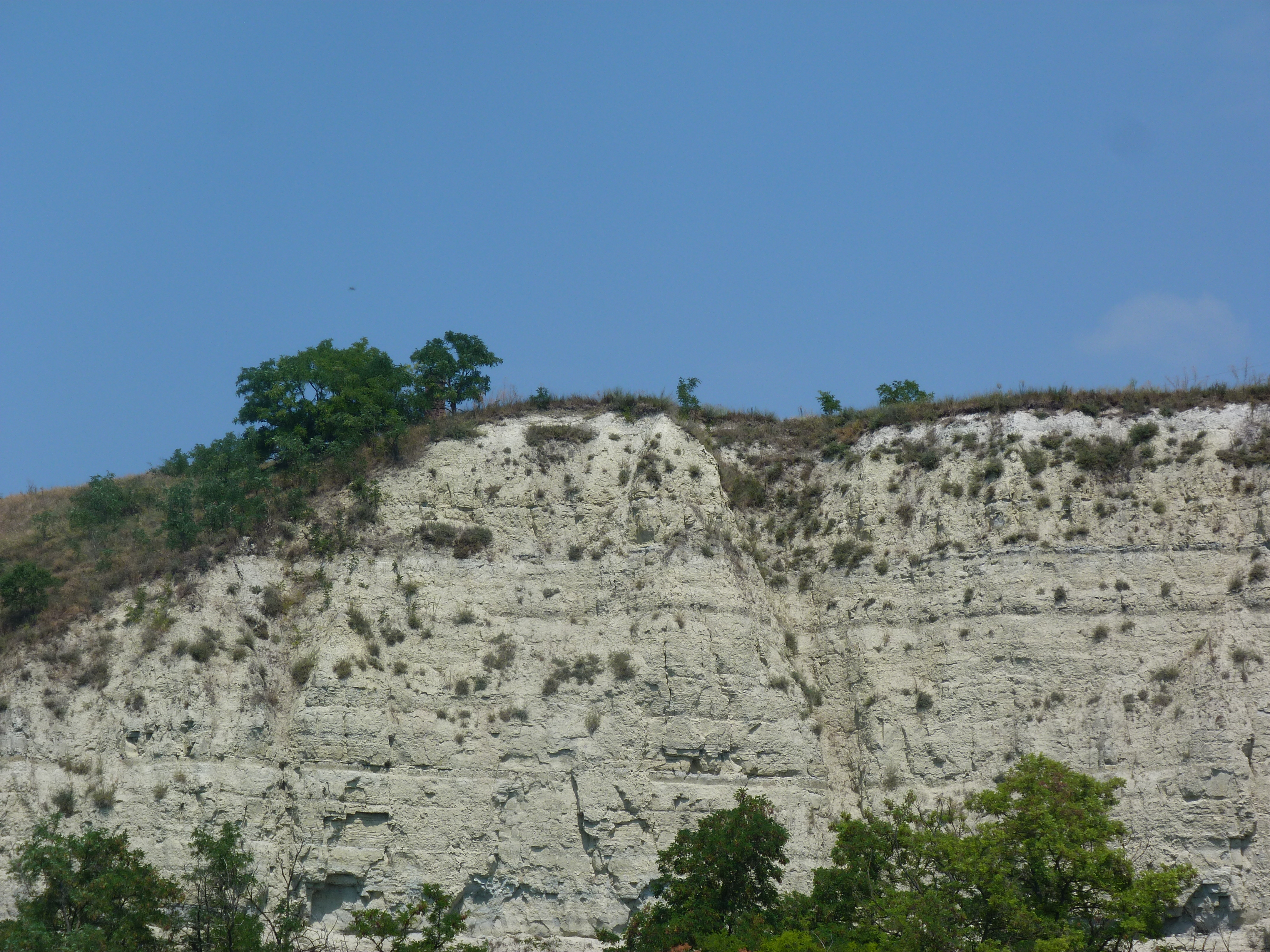 Kenesei-magaspart, Balatonkenese. Balatonfő (Partfő). Balatonfüzfőtől Balatonvilágosig kb. 80 méter magas löszfal szegélyezi a Balatont. Pontosabban ennek a partfalnak a felső kb. 2 méteres rétege lösz, alatta pannon üledék. Kenese felett emelkedik a Balaton nyugati partvonalának legmagasabb része, a Balatonfő. - - ©© Derzsi Elekes Andor, Budapest, 2015. Ajánlott hivatkozás: Derzsi Elekes Andor: Metapolisz DVD line